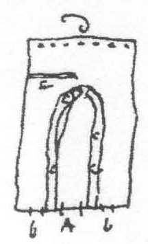 Store von Wilhelm Gauß und Carl Fallenstein in Glasgow Mo., Grundriss, Zeichnung von Wilhelm Gauß, 1840.